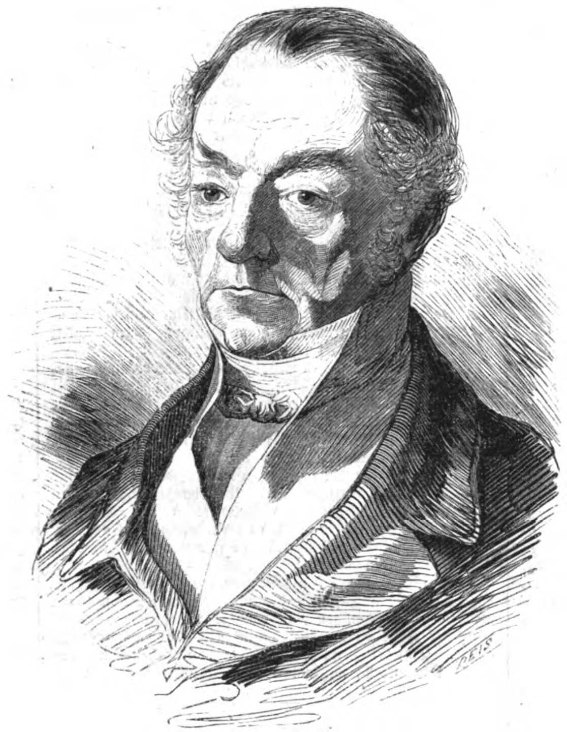 Anton Peter von Rummel, württembergischer Abgeordneter, 1847